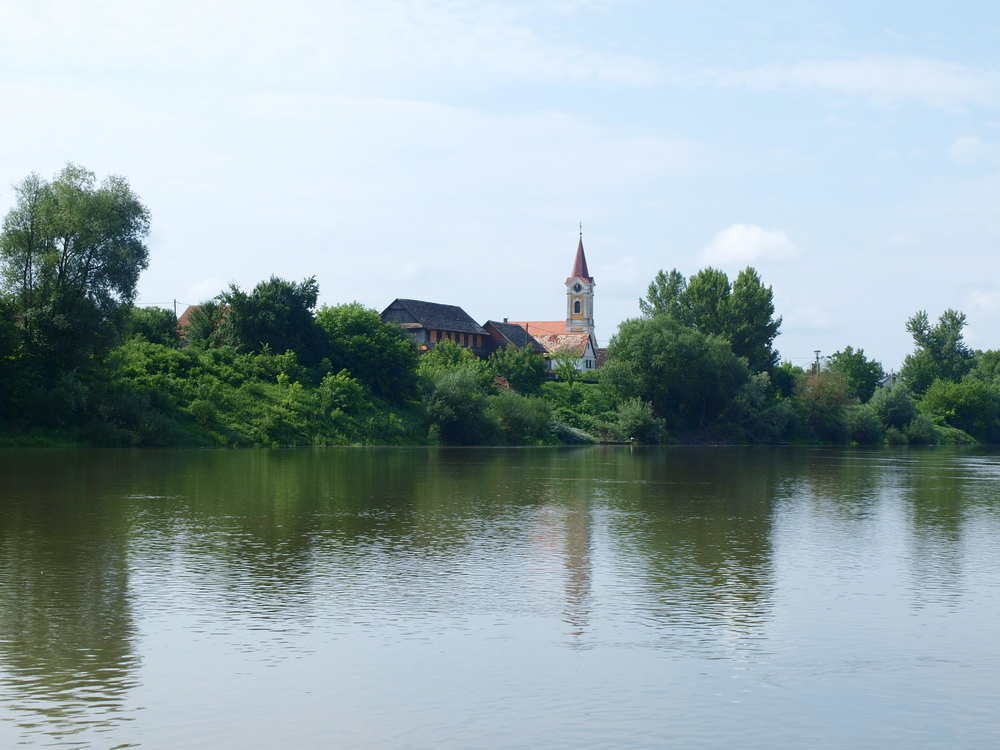 Selo Krapje (pogled sa rijeke Save), Sisačko-moslavačka županija.